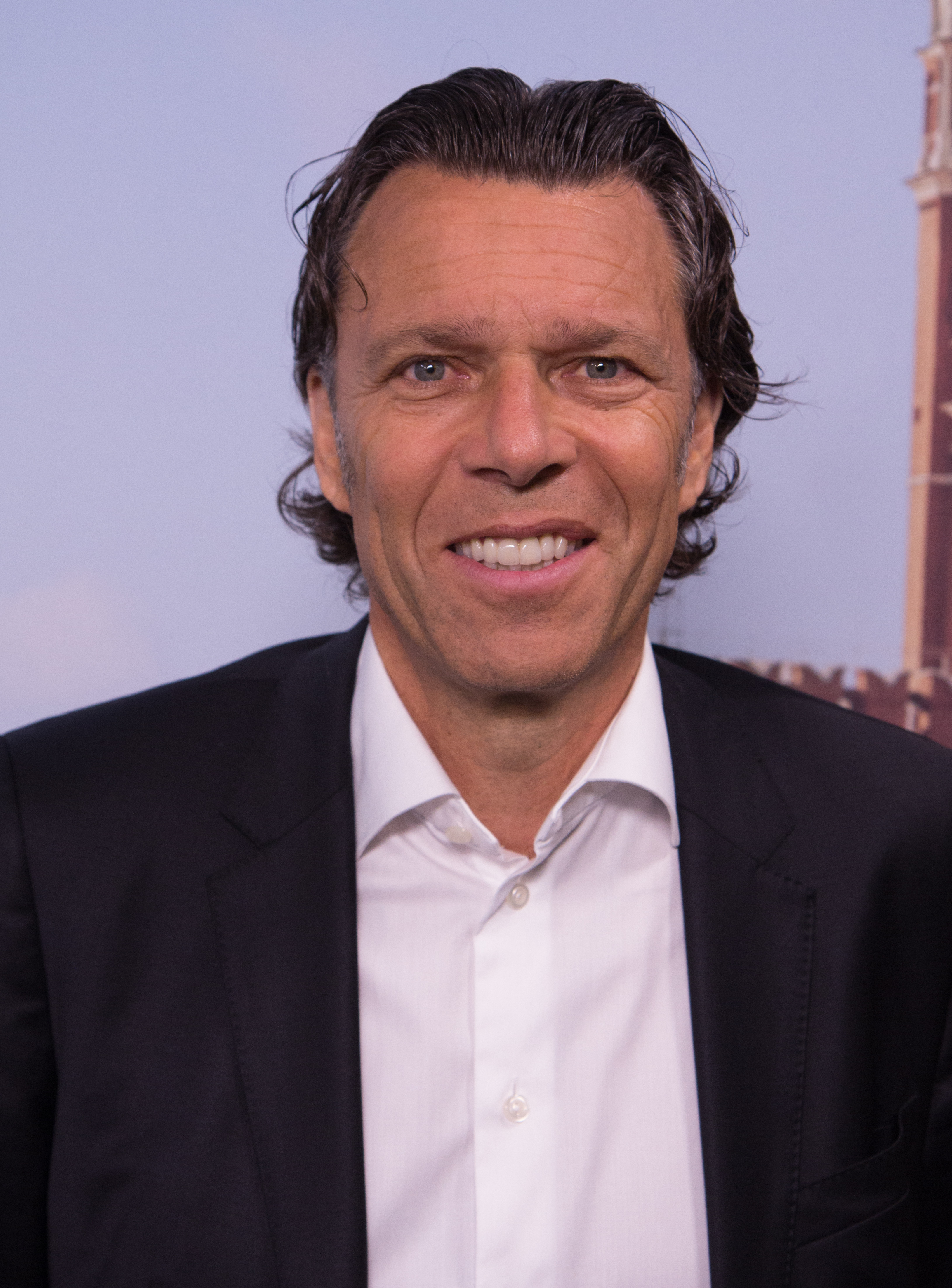 Urs Meier auf der Pressekonferenz von ARD und ZDF zur Fussball WM 2018 in Russland.